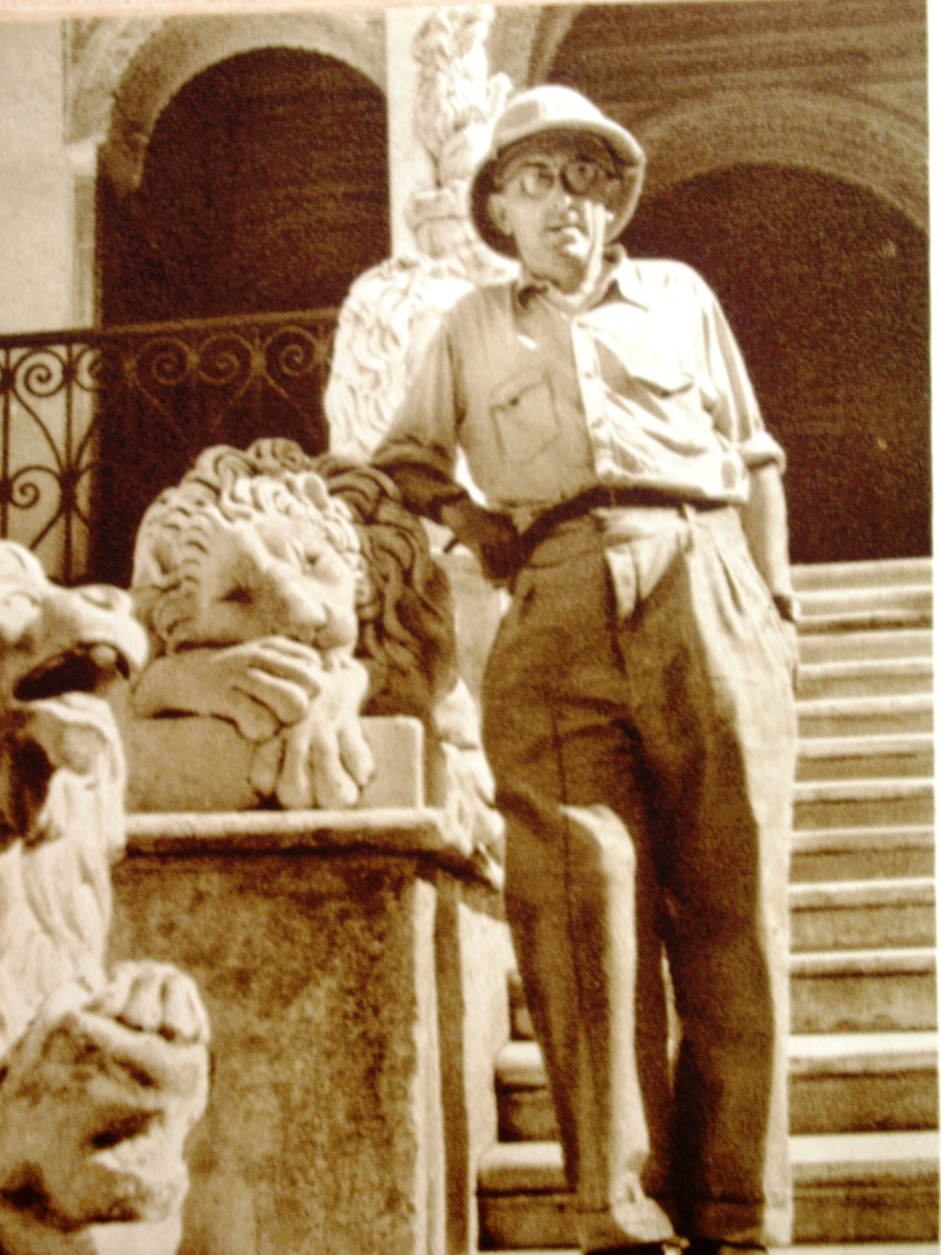 J.R.Vávra cestovatel v Tunisu v muzeu Bardó